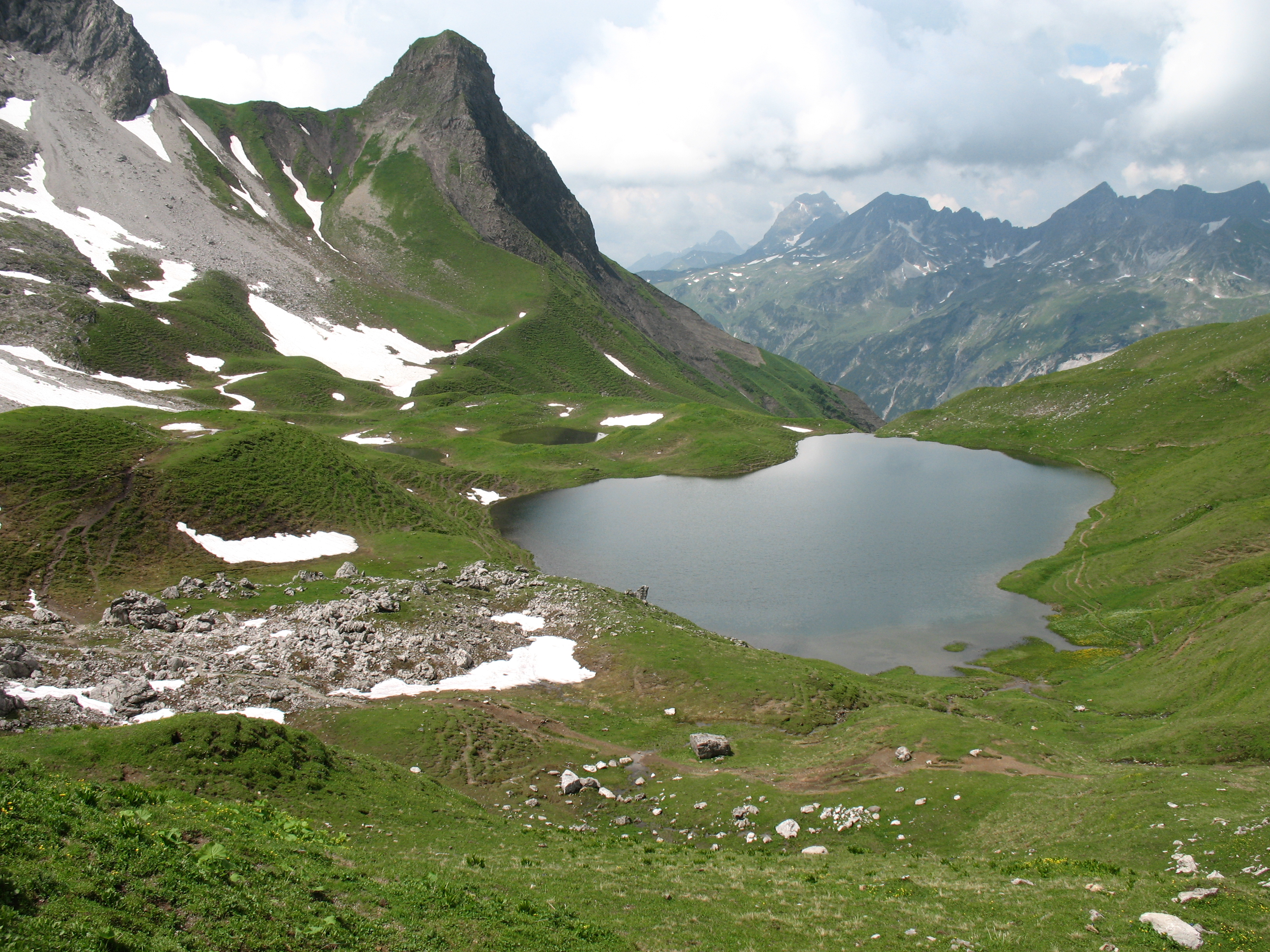 Blick auf den Rappensee (2047 m) und den Kleinen Rappenkopf (2276 m). Dahinter Großer Widderstein (2533 m), Geißhorn (2366 m), Liechelkopf (2384 m) und Elfer (2387 m).